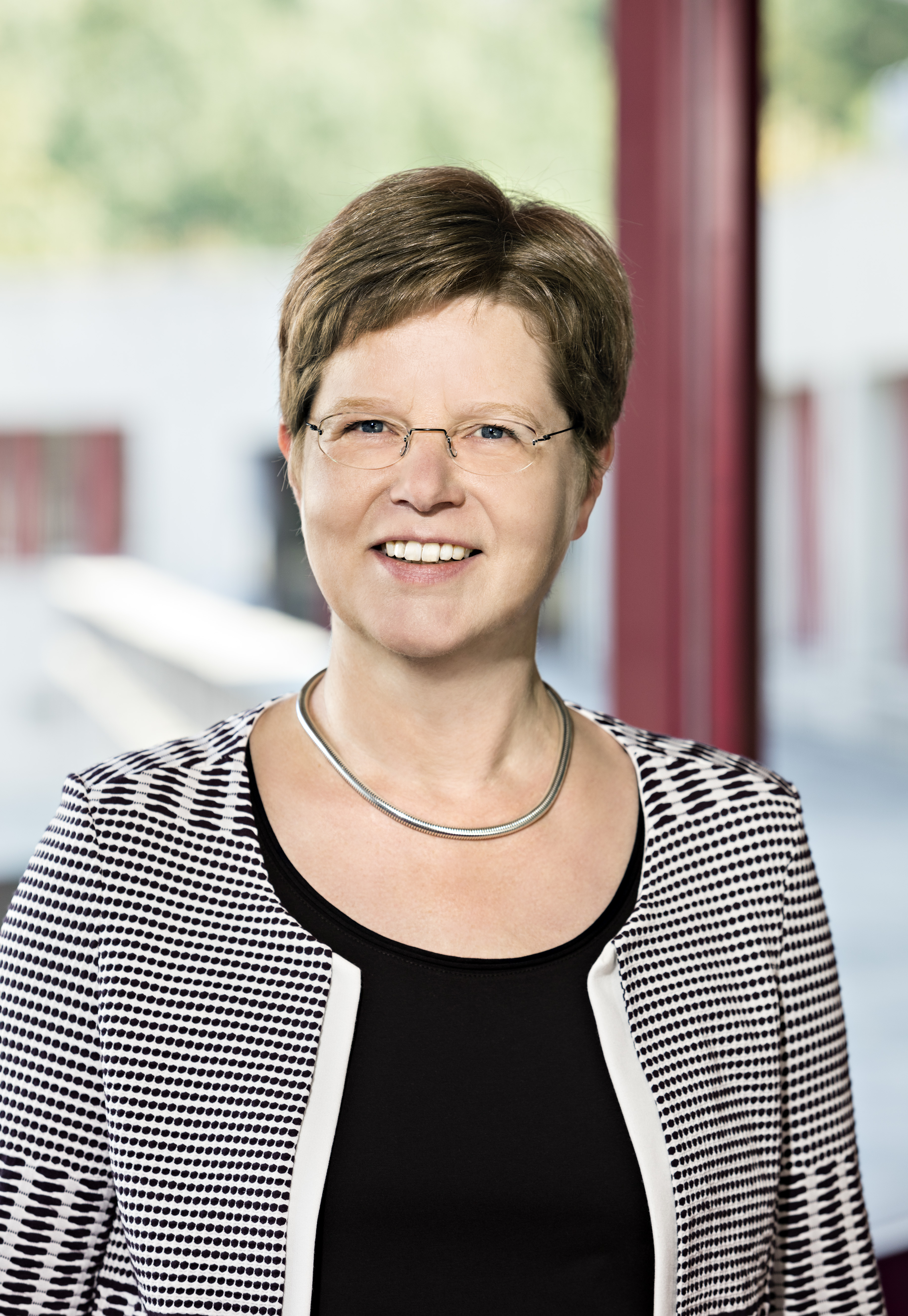 Professorin Dr. Susanne Rode-Breymann, Präsidentin der Hochschule für Musik, Theater und Medien Hannover